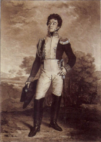 Ritratto di ufficiale, disegno, 50,5 x 35,7 cm, collezione privata